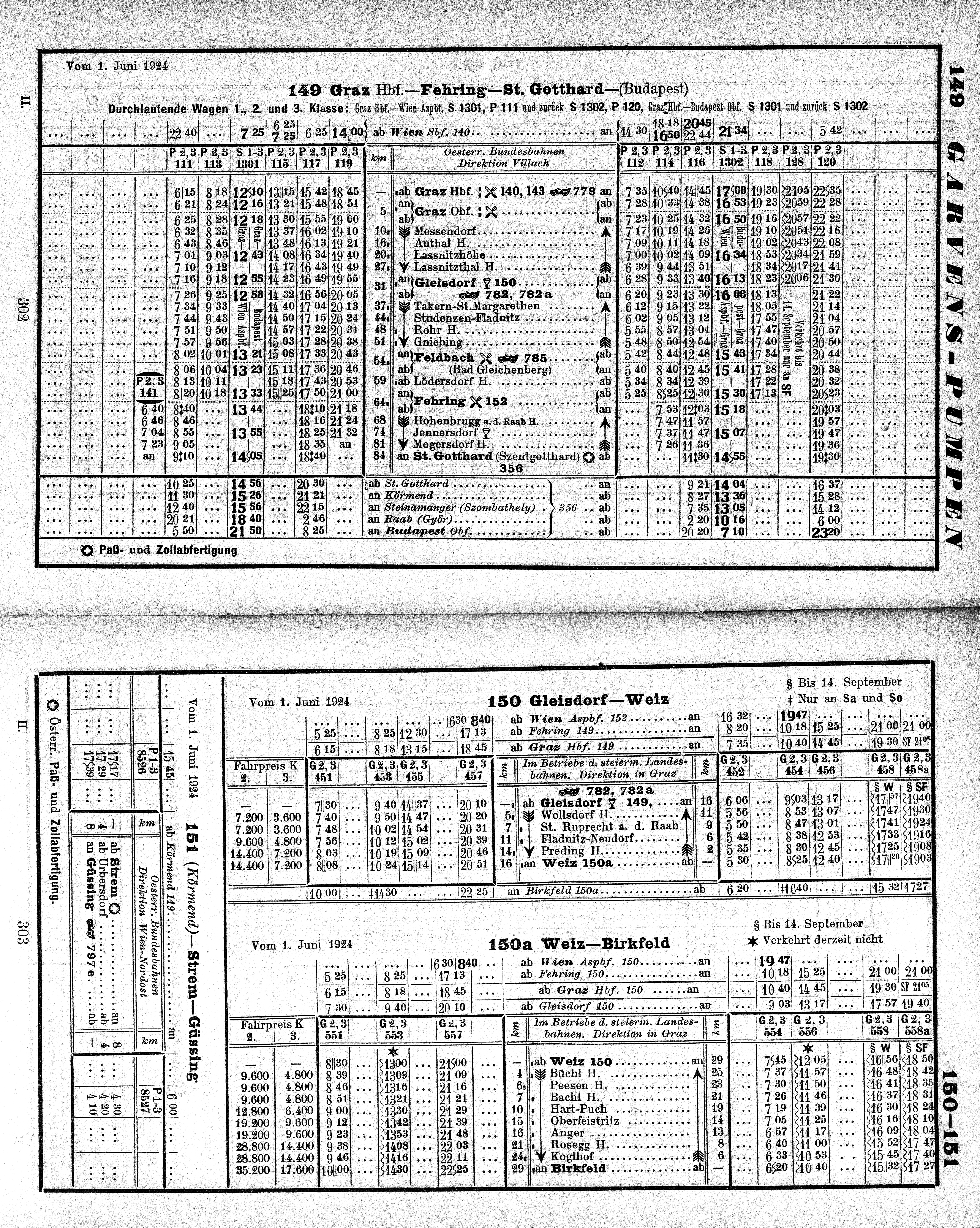 Fahrpläne der Eisenbahnverbindungen in der ungarischen Westbahn - steirischen Ostbahn, Graz, Fehring, Feldbach, Gleisdorf, St. Gotthard, Weiz Birkfeld, Strem, Güssing, Urbersdorf